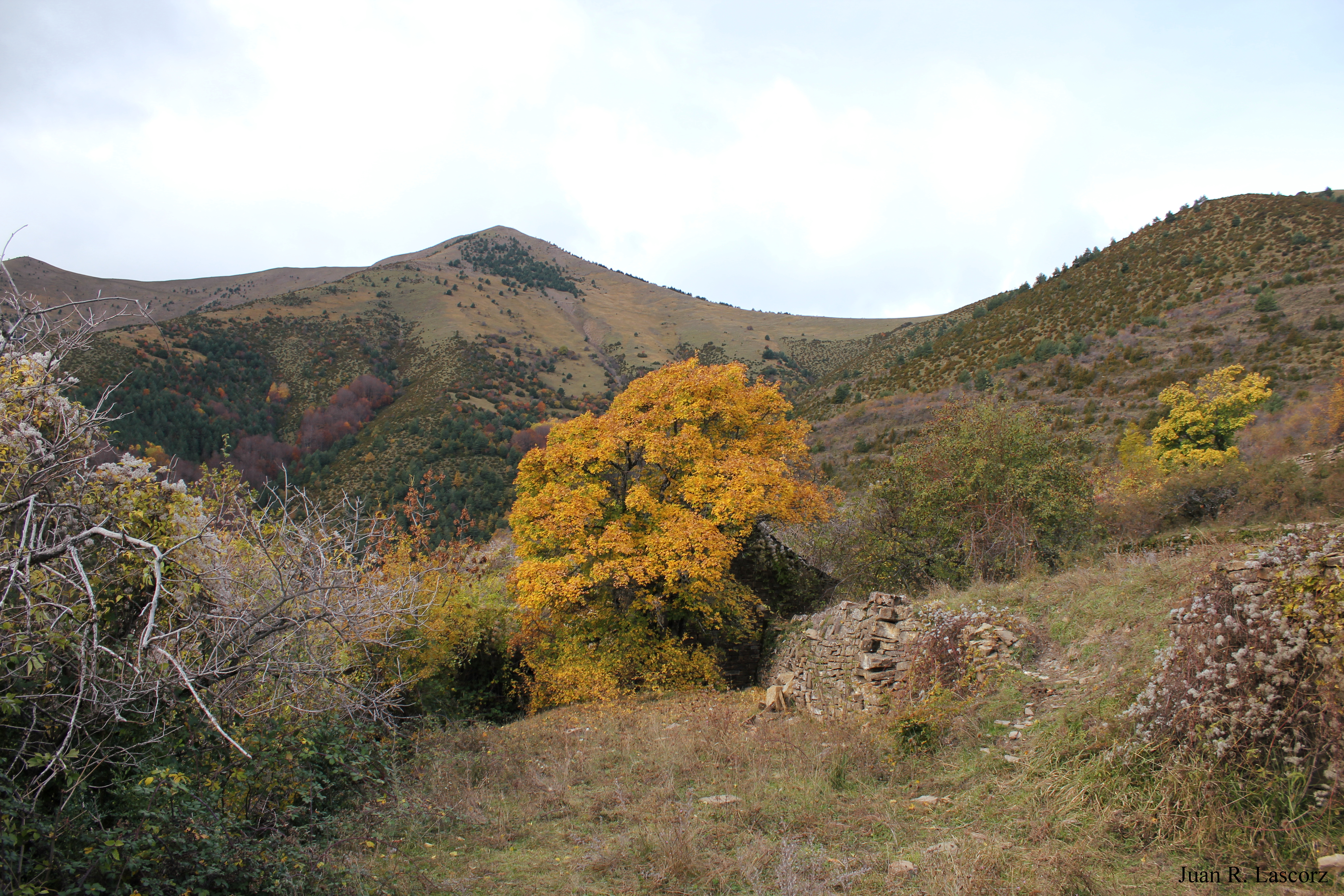 Aragonés: Tozal de Pelopín dende Yosa.